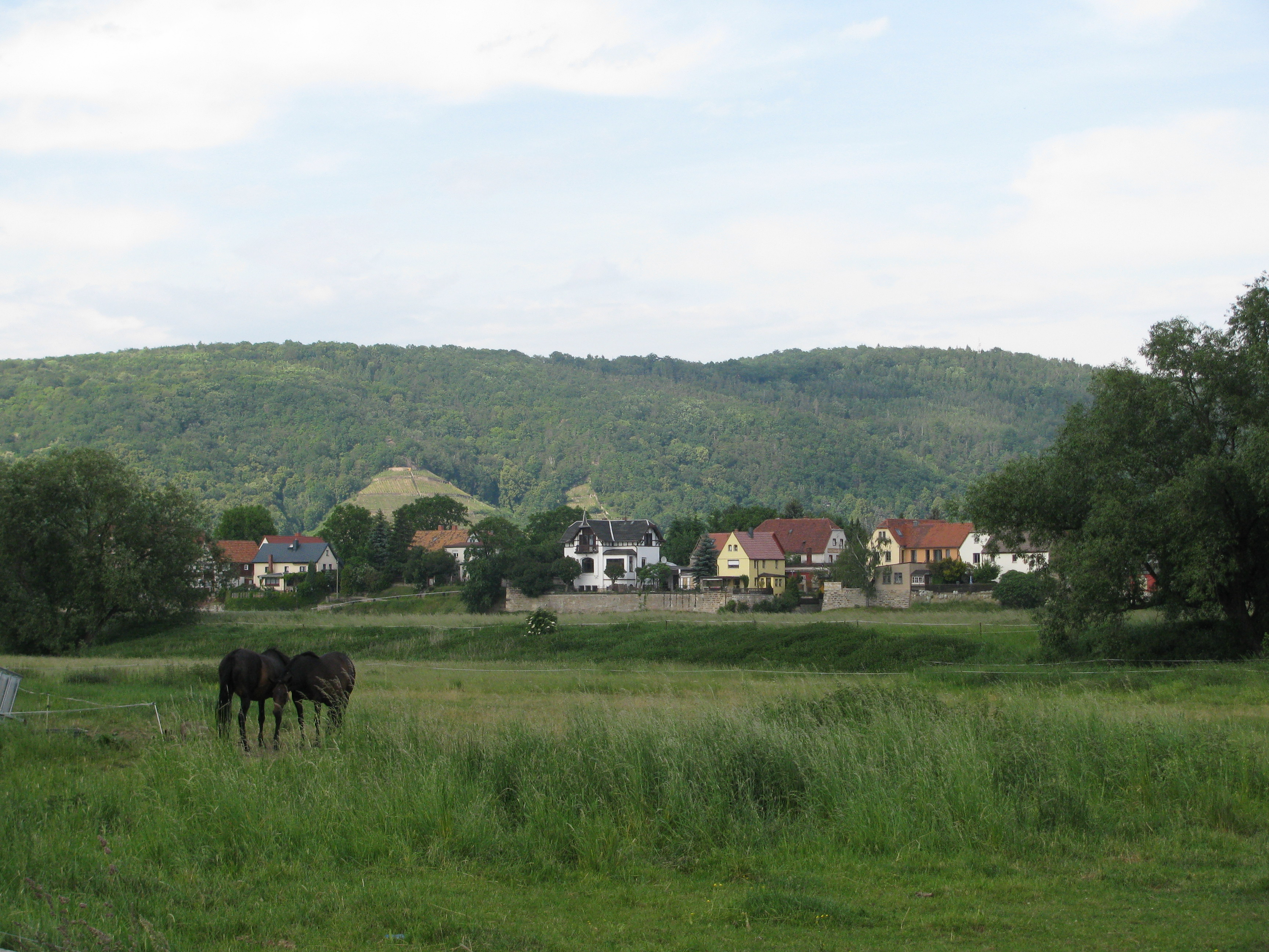 Blick von Zschieren über die Elbwiesen nach Söbrigen, im Hintergrund der Weinberg in Oberpoyritz und der Borsberg